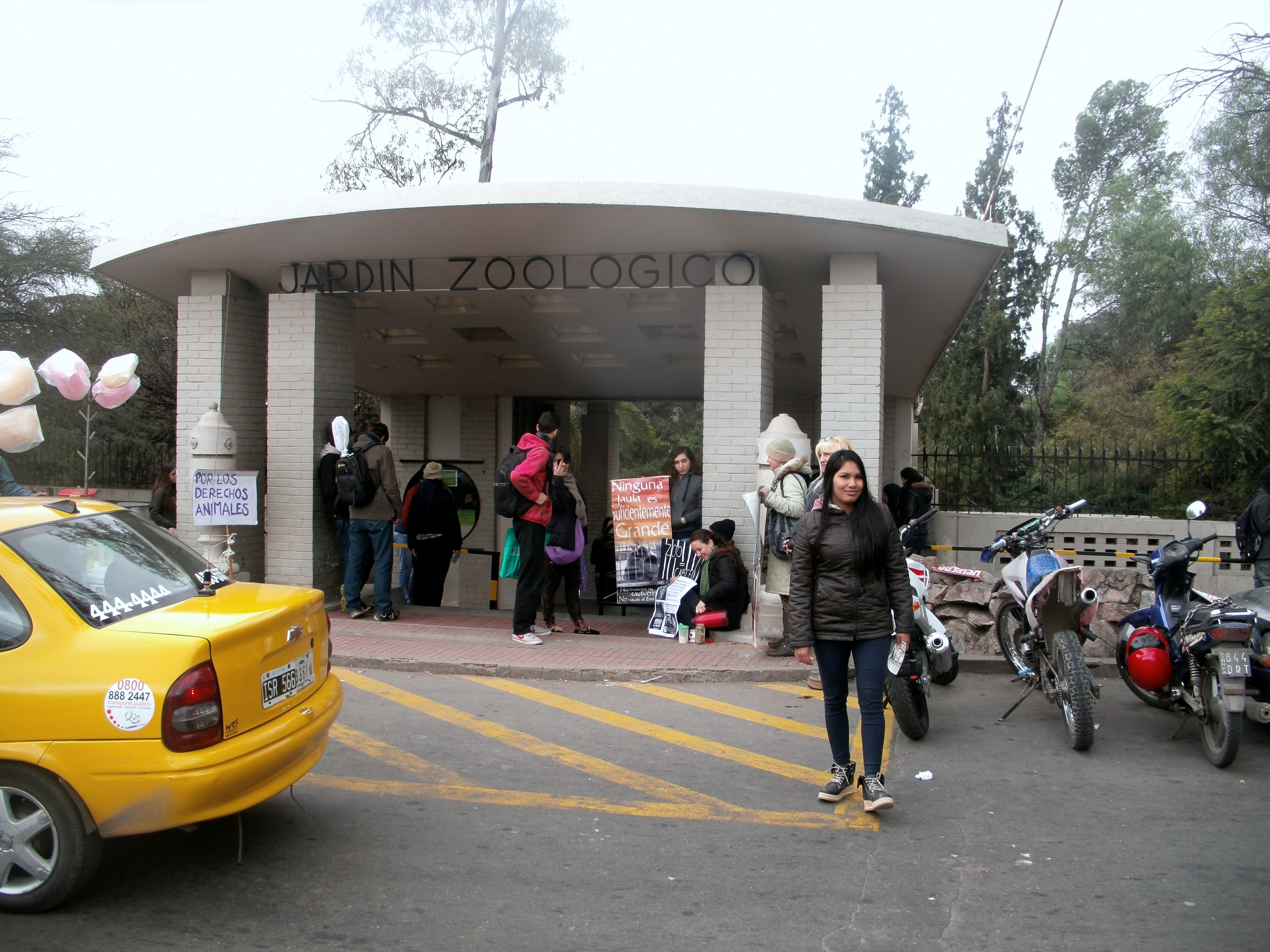 Ingreso al zoológico cordobés